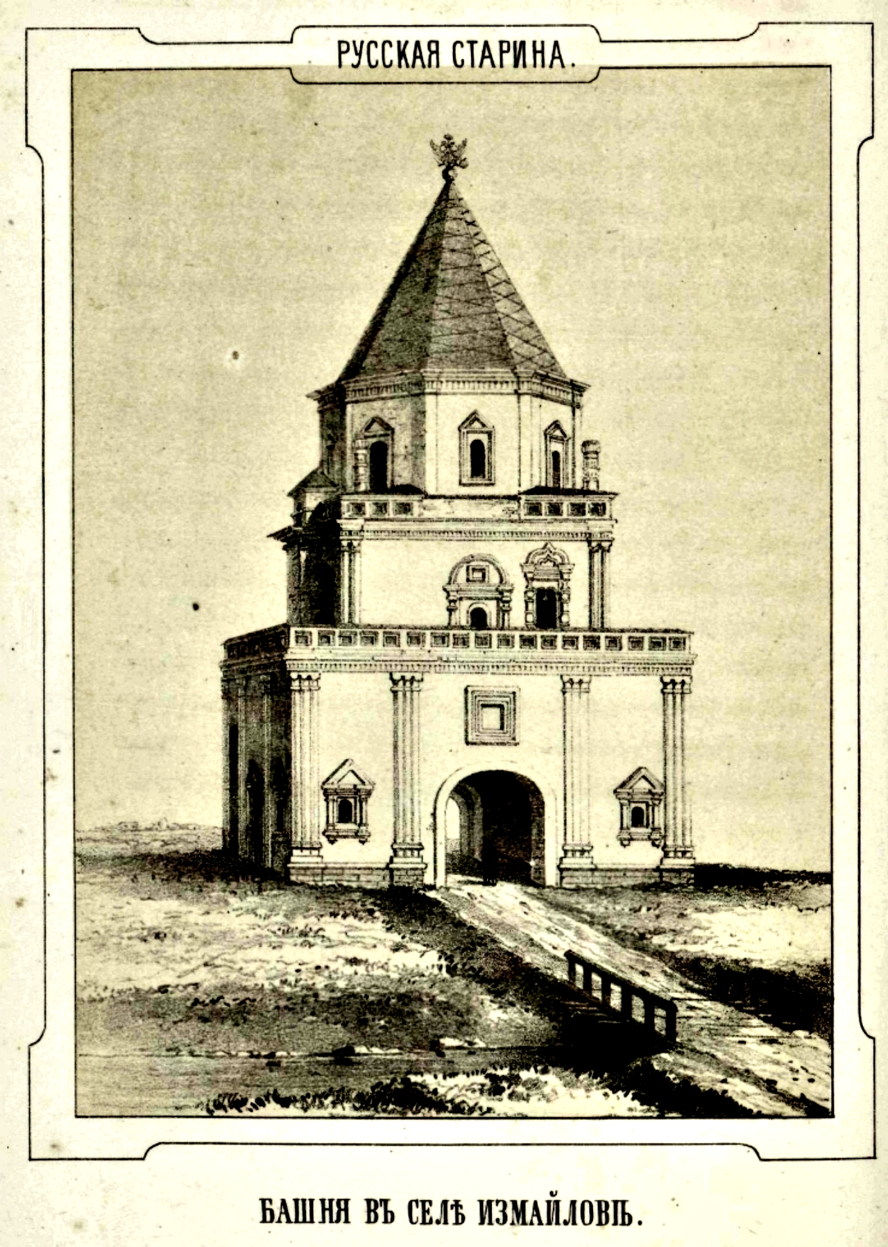 Измайловский дворец. Мостовая башня.